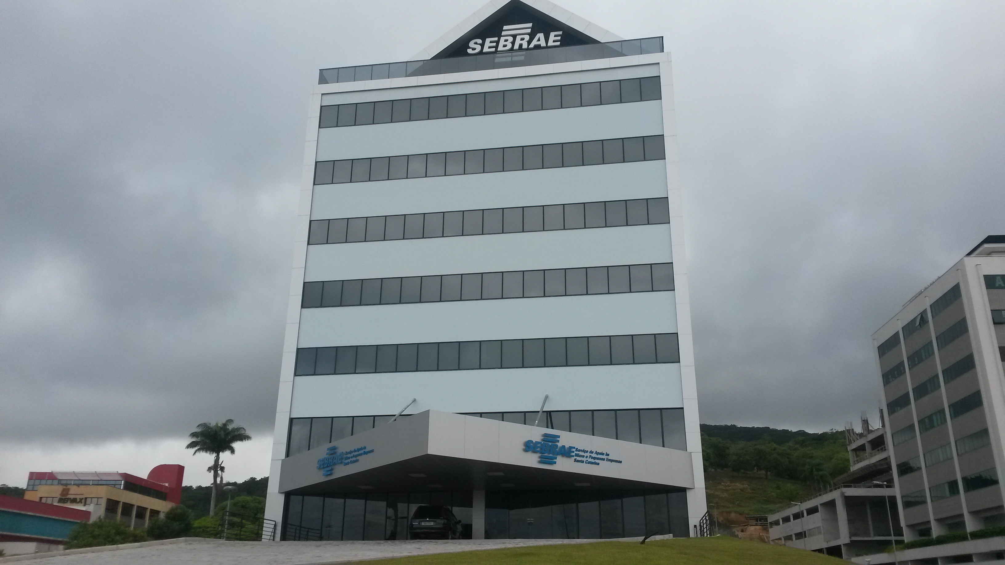 Prédio do Sebrae em Florianópolis, Brasil.